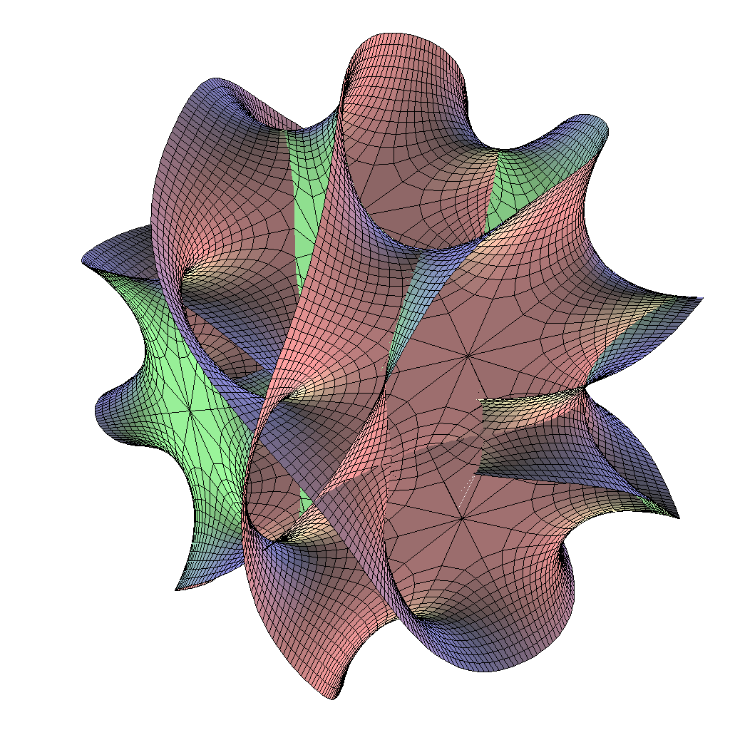 Quintic, 2d-Schnitt, erstellt mit Mathematica von Benutzer:Floriang.